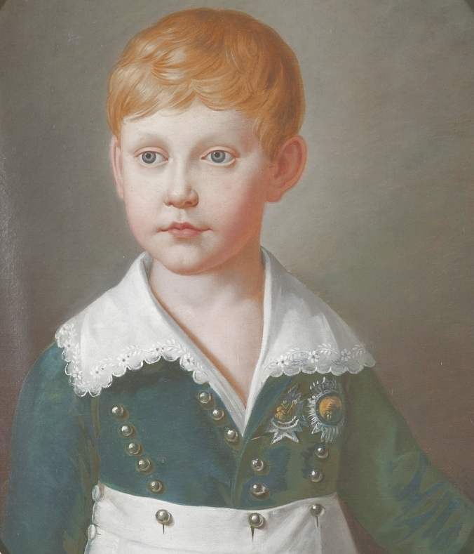 Leopoldo Giuseppe (1813 - 1860), conte di Siracusa, fu il sesto figlio di Francesco I e Maria Isabella